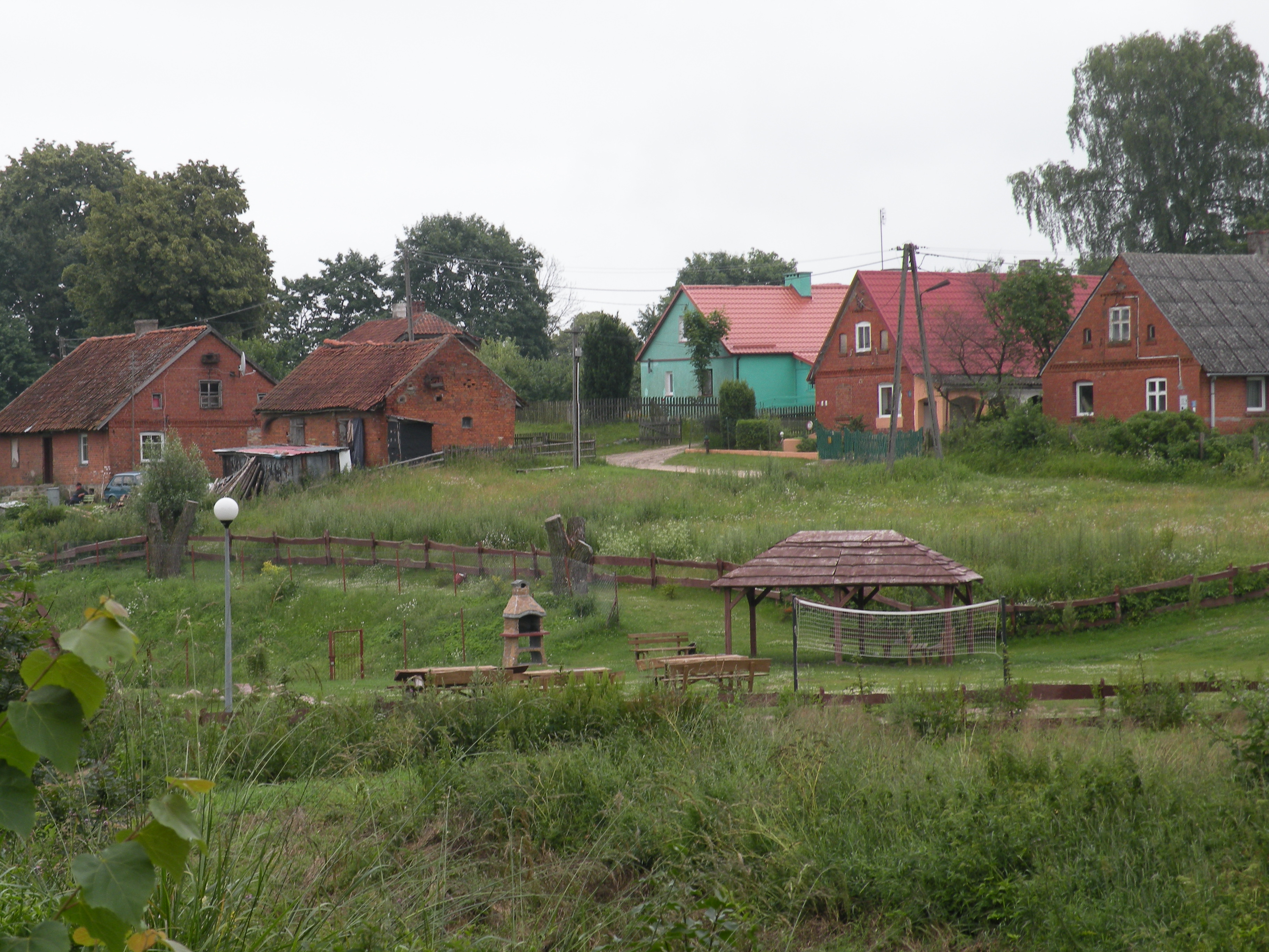 Bredynki